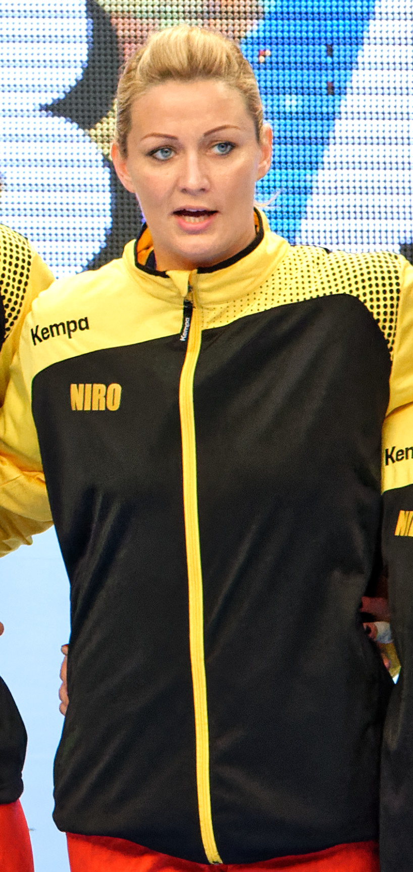 Gabriella Ibolya Szucs Le 29 novembre 2015, lors du match Roumanie / Cuba pour le compte du TIPIFF 2015. Au stade Pierre de Coubertin à Paris.